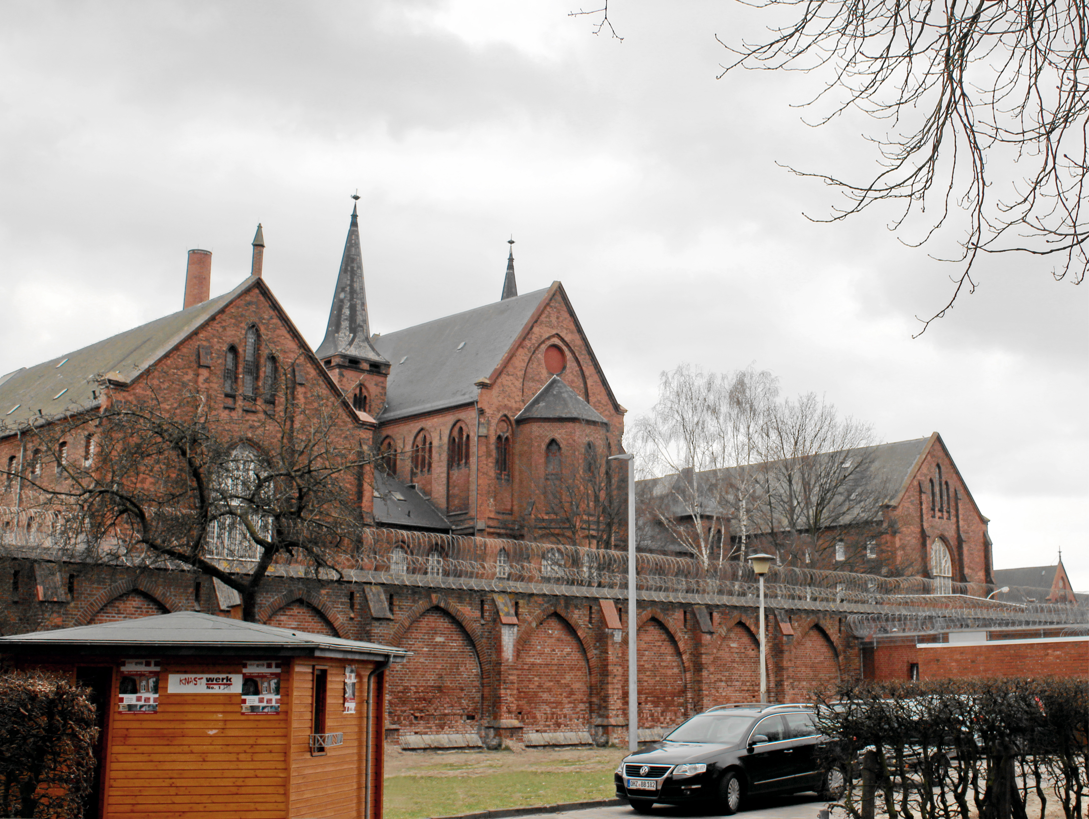 Strafanstalt Oslebshausen, Hauptgebäude, Justizvollzugsanstalt Oslebshausen in Bremen, Sonnemannstraße 2. Das abgebildete Objekt ist ein geschütztes Kulturdenkmal in der Freien Hansestadt Bremen, mit der Nr. 1344 beim Landesamt für Denkmalpflege registriert.